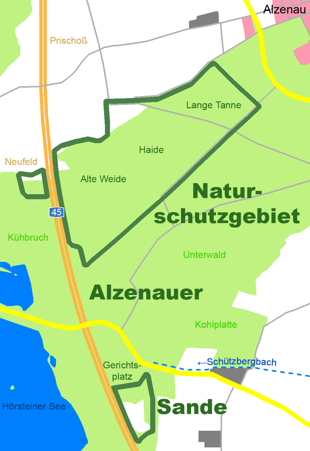 Karte des Naturschutzgebietes Alzenauer Sande bei Alzenau, Bayern Grünfläche, Wiesen Siedlungsfläche Wald Gewässer Feld- und Waldwege Naturschutzgebietsgrenze Autobahn Hauptstraße